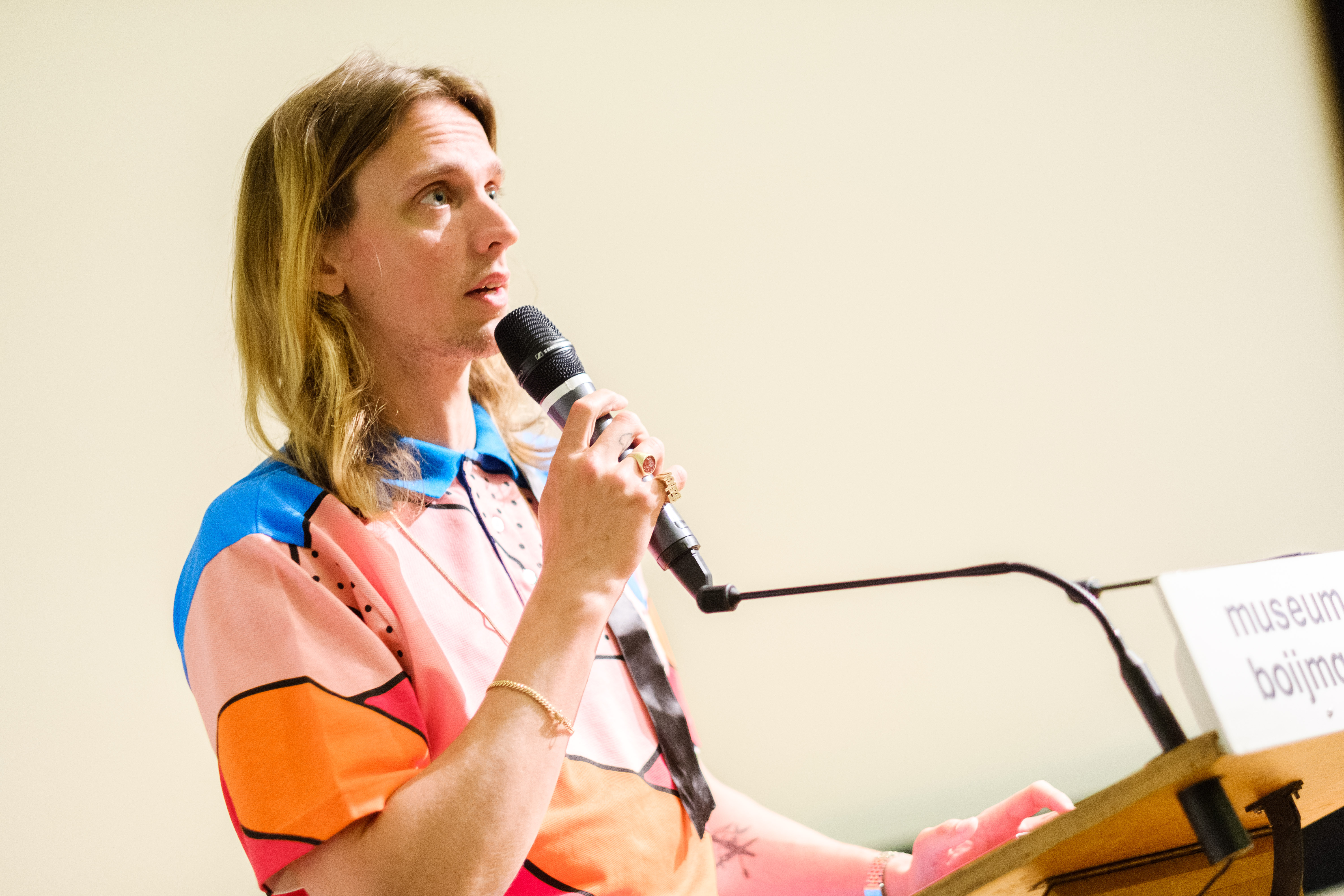 Op 26 mei vond een literaire avond plaats in Museum Boijmans van Beuningen. Tijdens deze literaire avond brachten Pepijn Lanen, Nico Dijkshoorn, Ellen Deckwitz en conservator Saskia van Kampen een ode aan het surrealisme en leerde het publiek op verrassende wijze alles over surrealistische schrijftechnieken. Na het programma was er de gelegenheid om de tentoonstelling Gek van surrealisme te bezoeken. De avond werd georganiseerd in samenwerking met Projectstudio Cornelis Serveert en werd gepresenteerd door Yuki Kho van Kunstkijken met Ko & Kho. Kijk voor meer informatie op